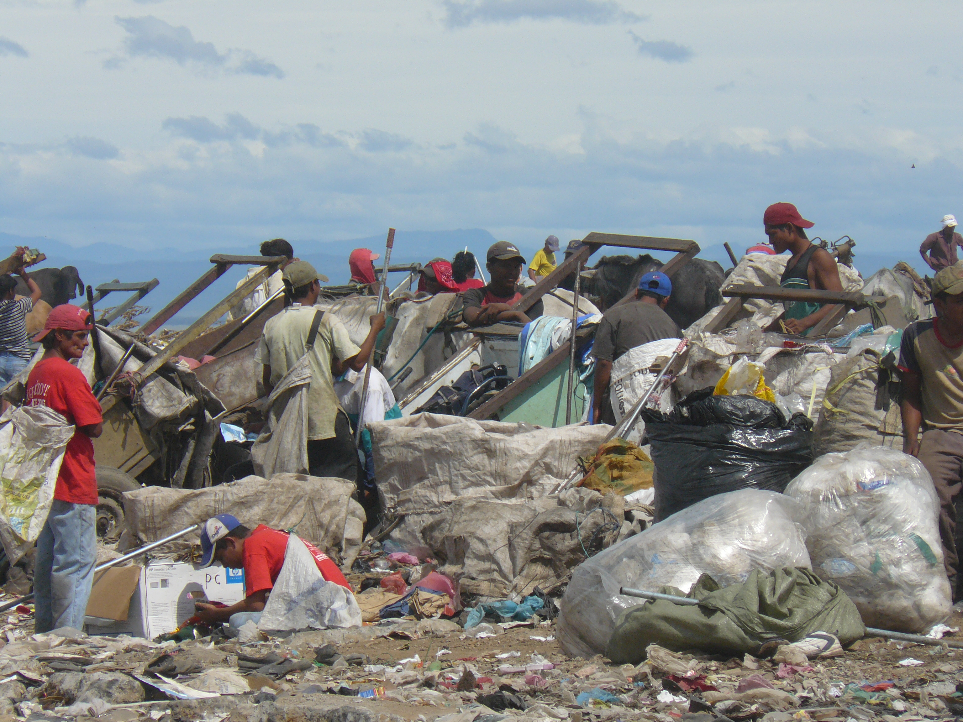 Carritos de caballos en el vertedero de la Chureca, Managua